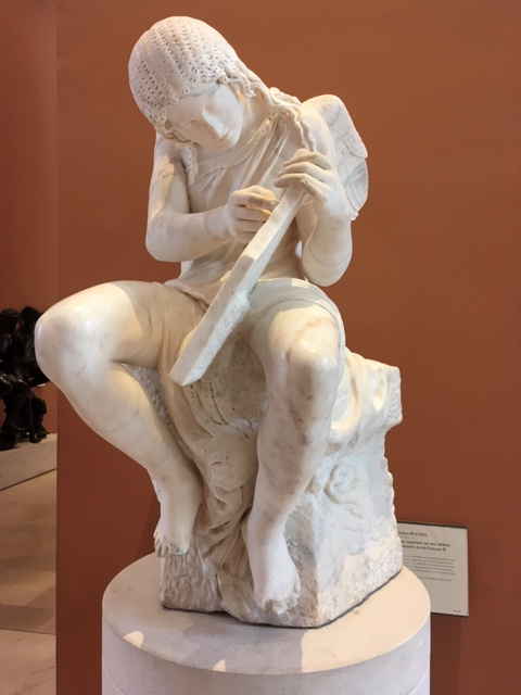 Frémyn Roussel, Génie funéraire de François II, vers 1560-1565, marbre, Paris, musée du Louvre